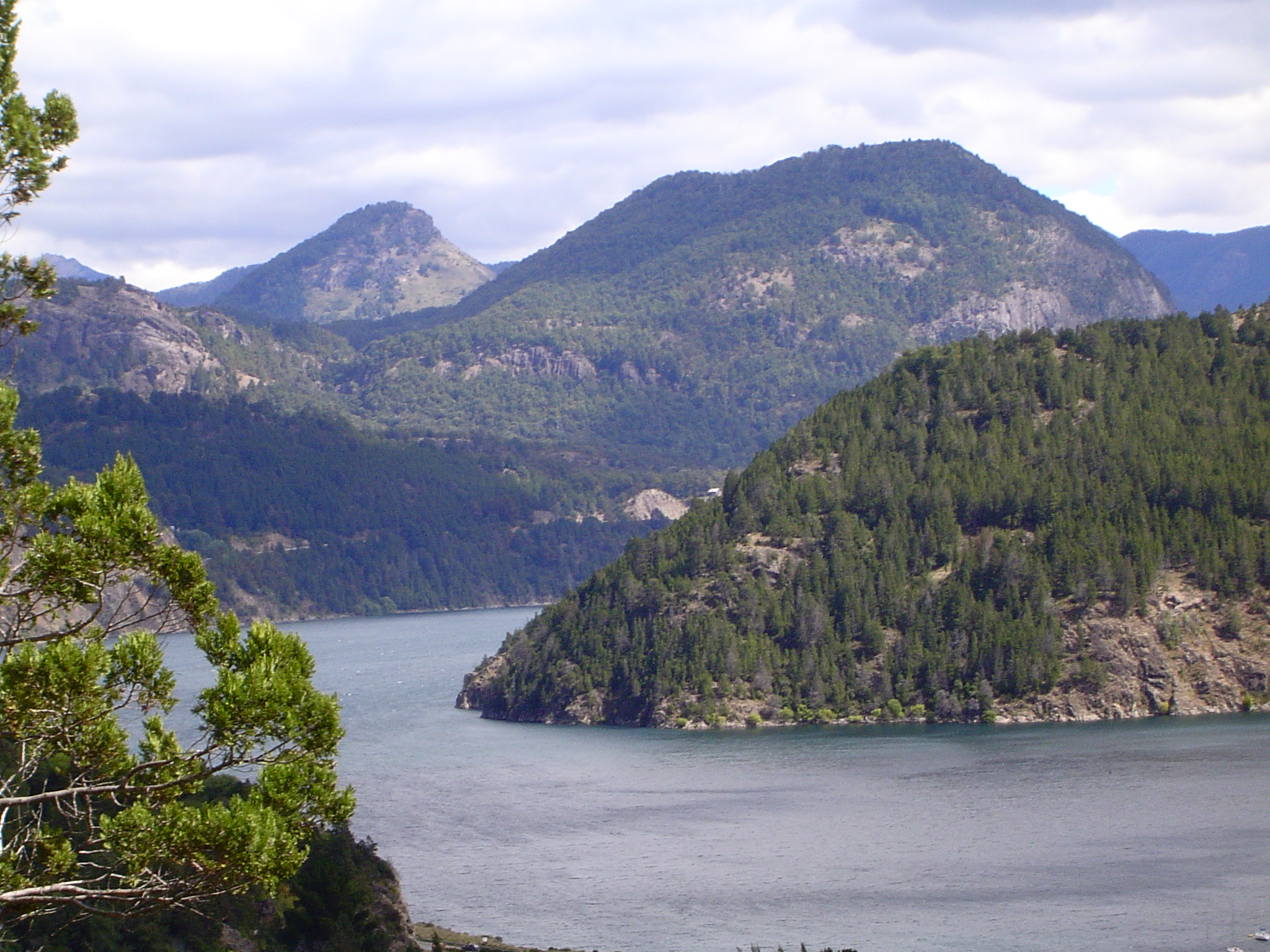 Vista del Lago Lácar, en los alrededores de San Martín de los Andes, Provincia de Neuquén, República Argentina. Fotografía tomada el 15 de marzo de 2006.